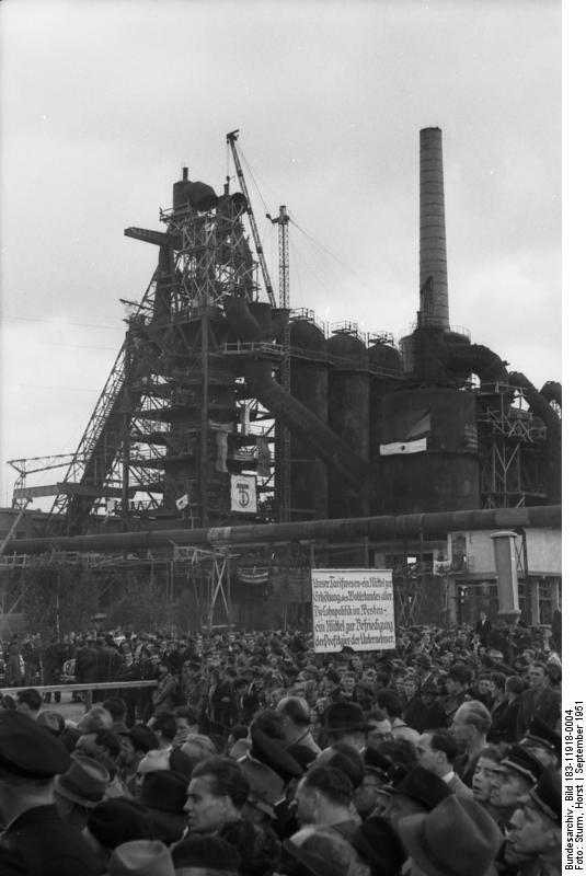 EKO, Kundgebung vor Hochofen Illus/Sturm Das erste Roheisen vom Hüttenkombinat Ost. Hochofen 1, dessen Grundstein am ersten Tag unseres Fünfjahrplans gelegt wurde, lieferte das erste, mit Hilfe polnischer Kohle aus sowjetischem Erz erschmolzene Roheisen für die deutsche Friedensindustrie. U.B.z.: Blick auf die Kundgebung vor dem Hochofen Nr. 1